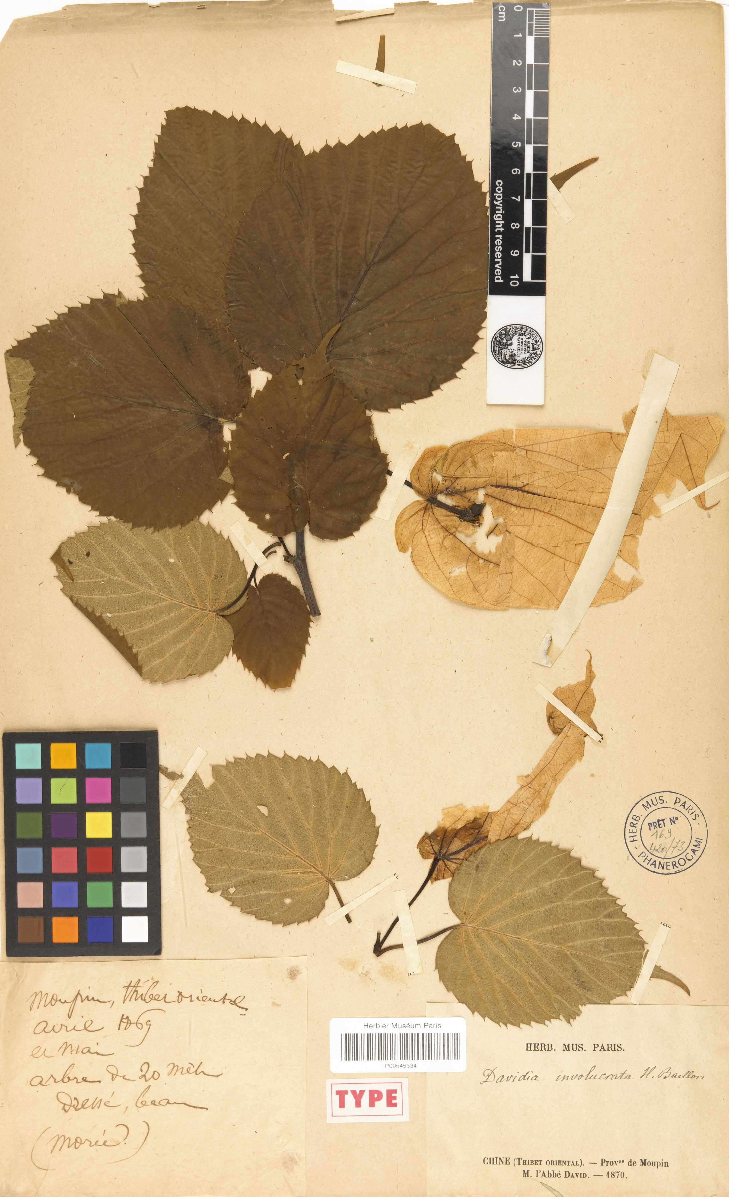 Feuille d'herbier du père David, de Davidia involucrata, envoyé au Muséum national d'histoire naturelle